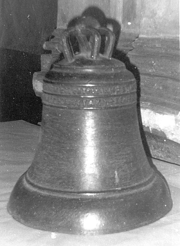 Dzwon Szedybora Wolimuntowicza, muzeum w Wilnie